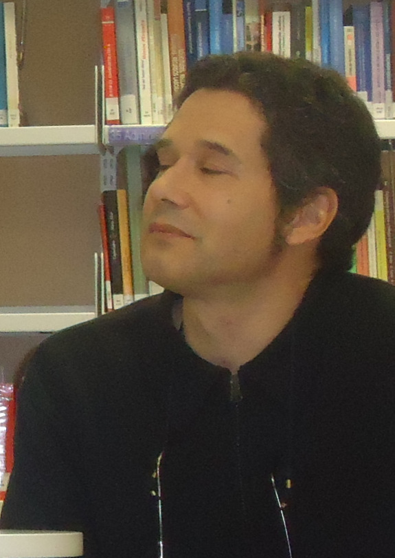 Marc Romera, editor de LaBreu Edicions a la biblioteca de Cambrils durant la presentació d'un llibre